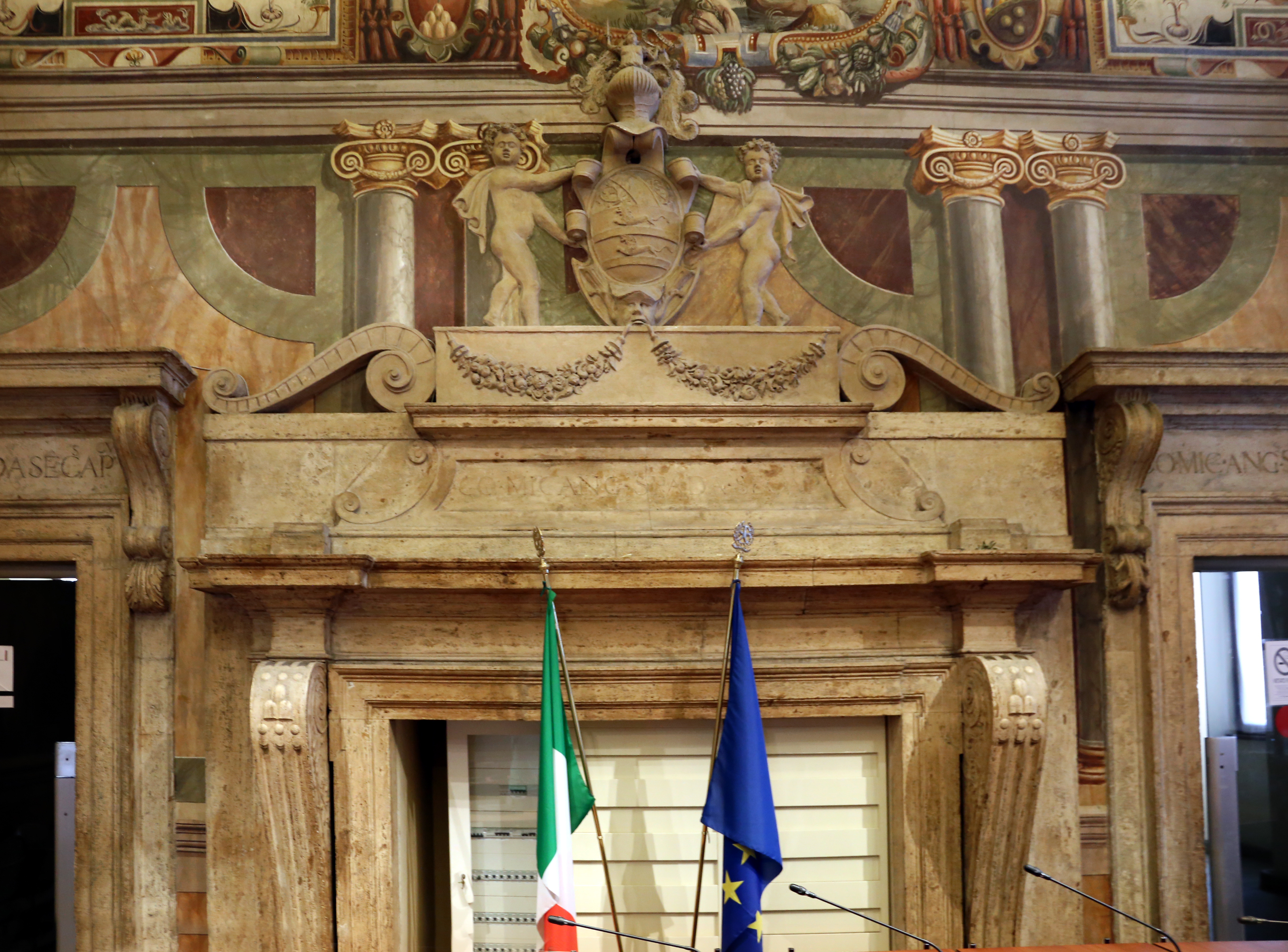 Palazzo Spada (Terni) - Sala di Fetonte This is a photo of a monument which is part of cultural heritage of Italy.